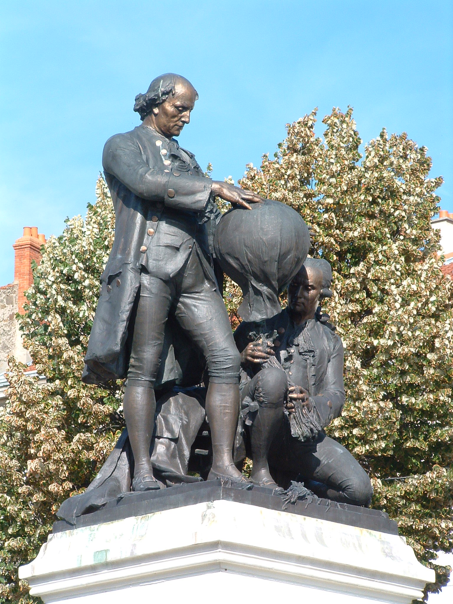 Annonay, Statue en bronze des frères Montgolfier, sculpteur Henri Louis Cordier (1853–1925)